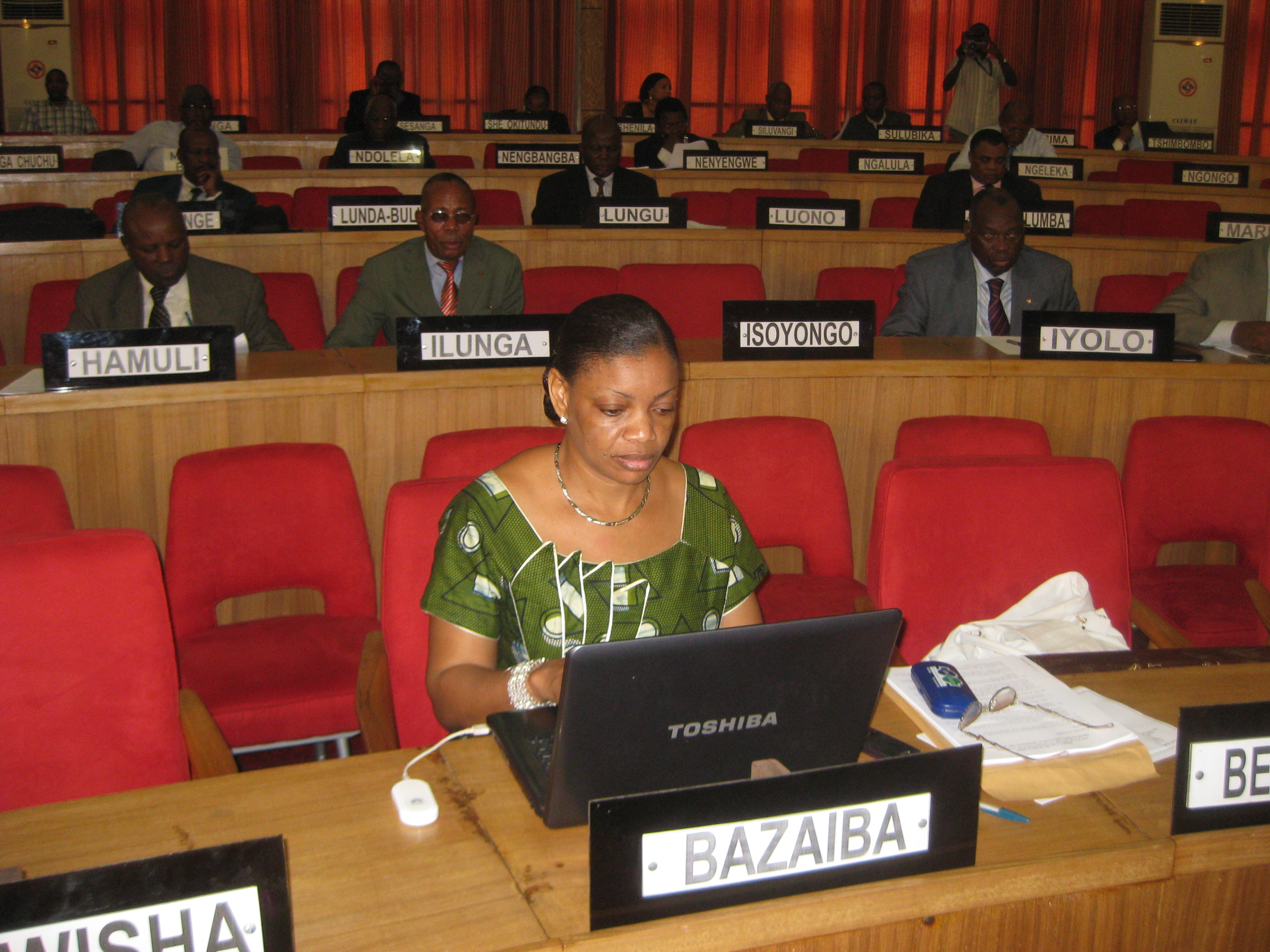 Ève Bazaiba, sénatrice congolaise, en séance; Sénateurs congolais (Congo-Kinshasa) en séance, photo prise le 14 octobre 2009 par Radio Okapi.